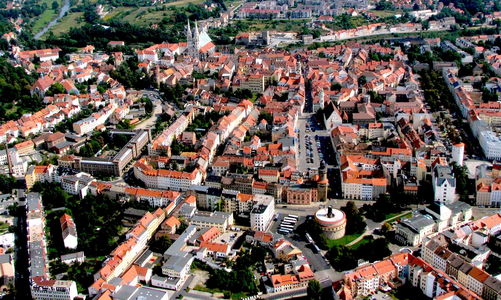 Görlitz Luftbild der Stadtansicht vorn Museum Demianiplatz hinten Kirche St. Peter an der Neiße - Foto Wolfgang Pehlemann Wiesbaden IMG_0044